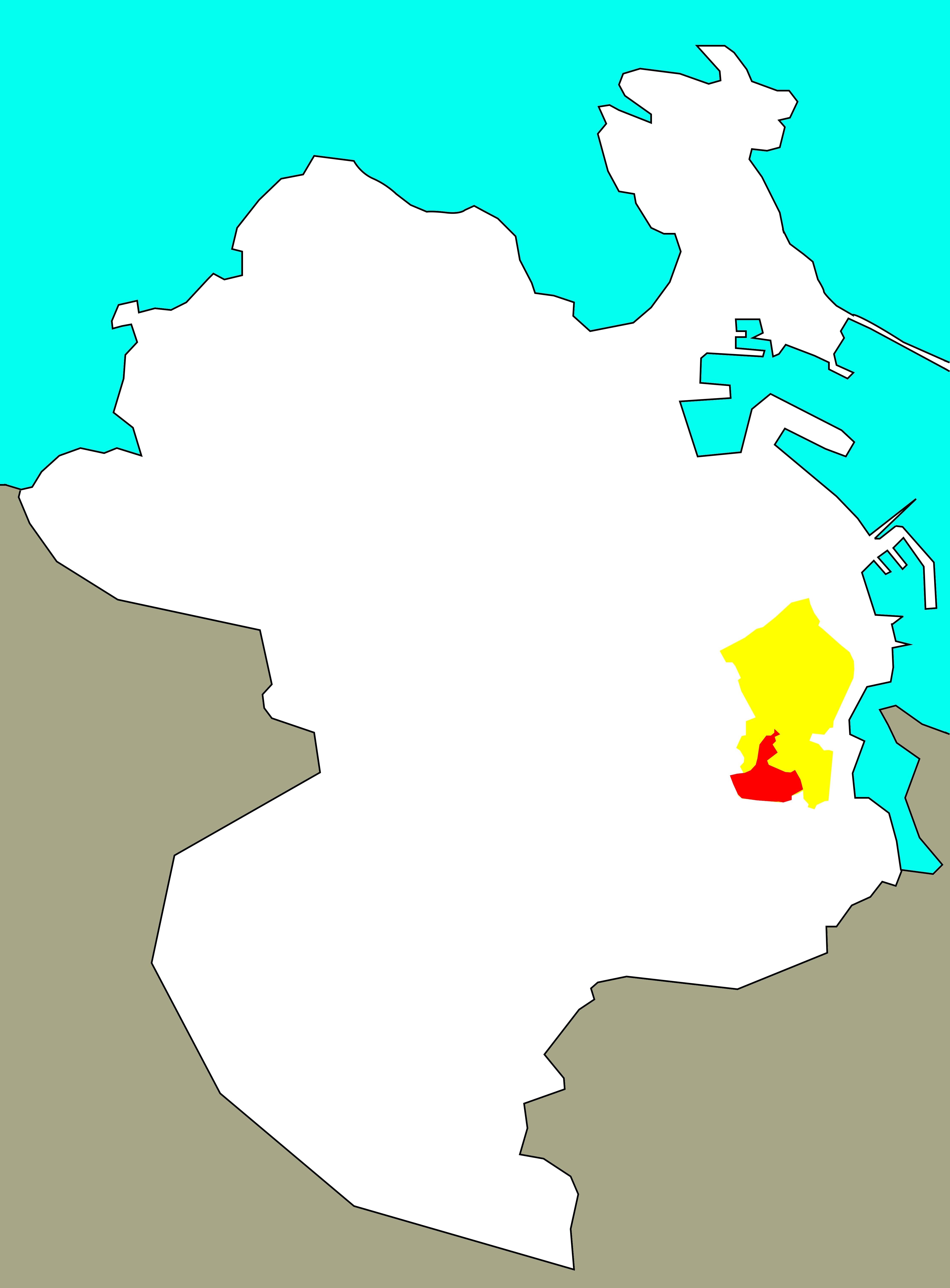 Situación do Monte Mero no "barrio-territorio" de Eirís, segundo